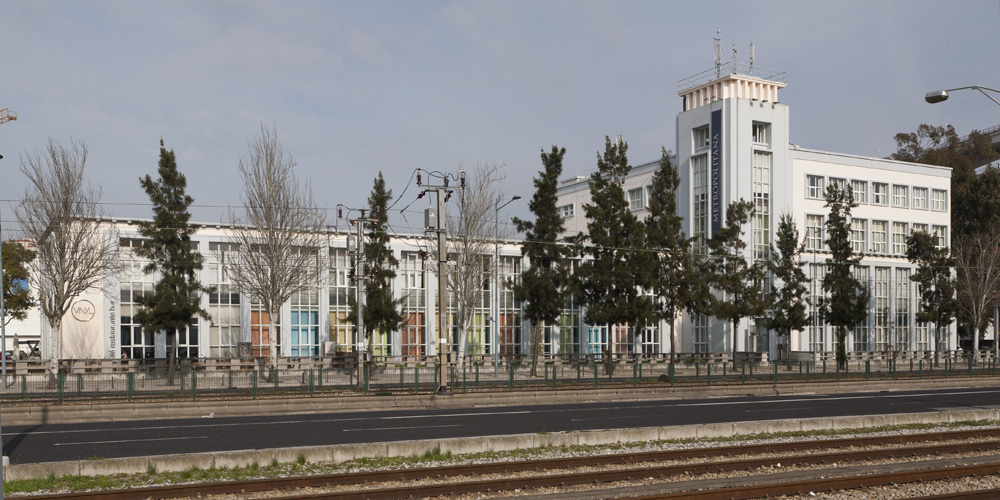 Standard Elétrica, Av. da Índia, Lisboa; Arq. Cotinelli Telmo